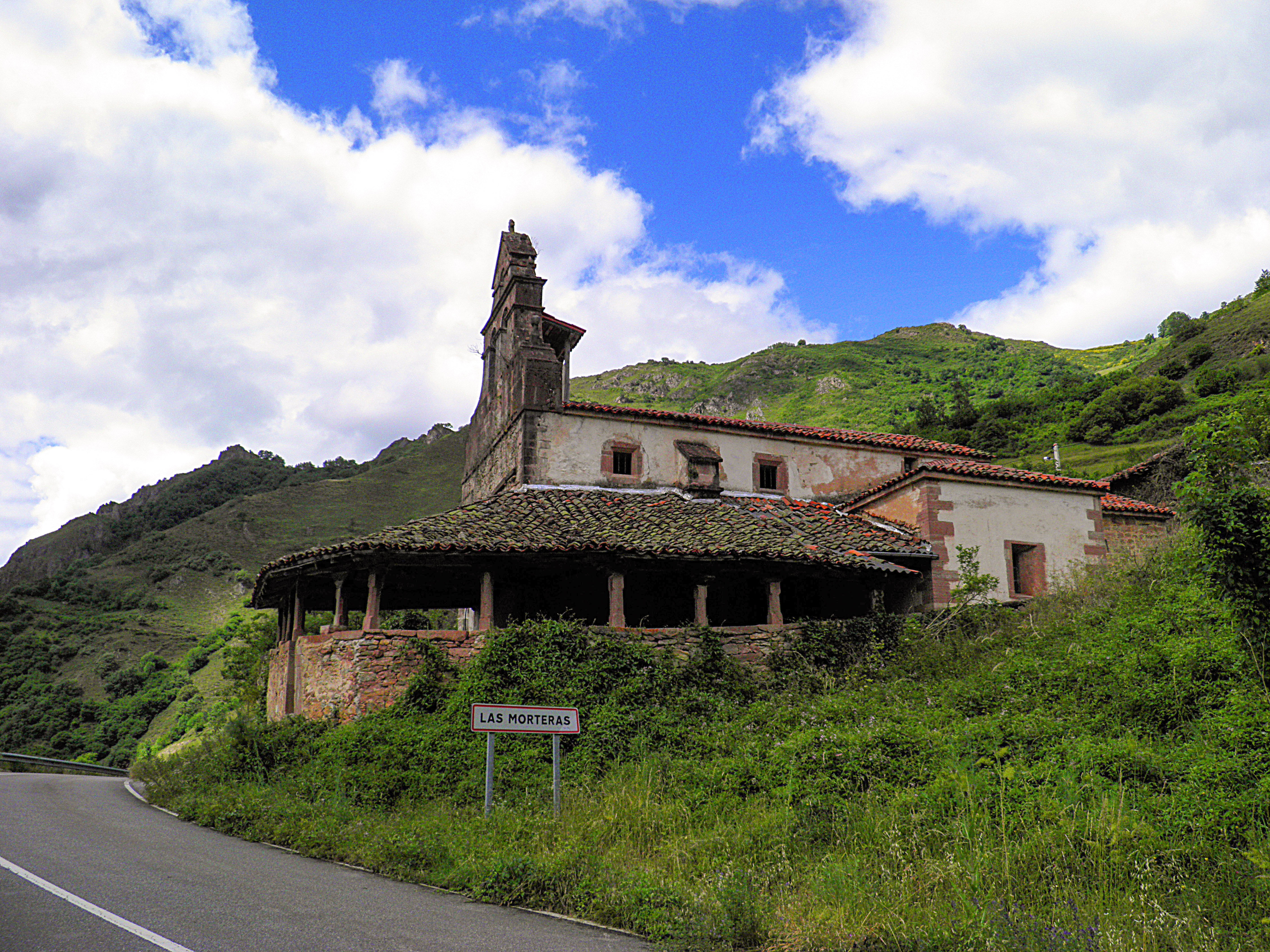 Las Morteras (Somiedo, Asturias)